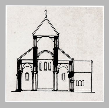 A lébényi műemléktemplom épületmetszete